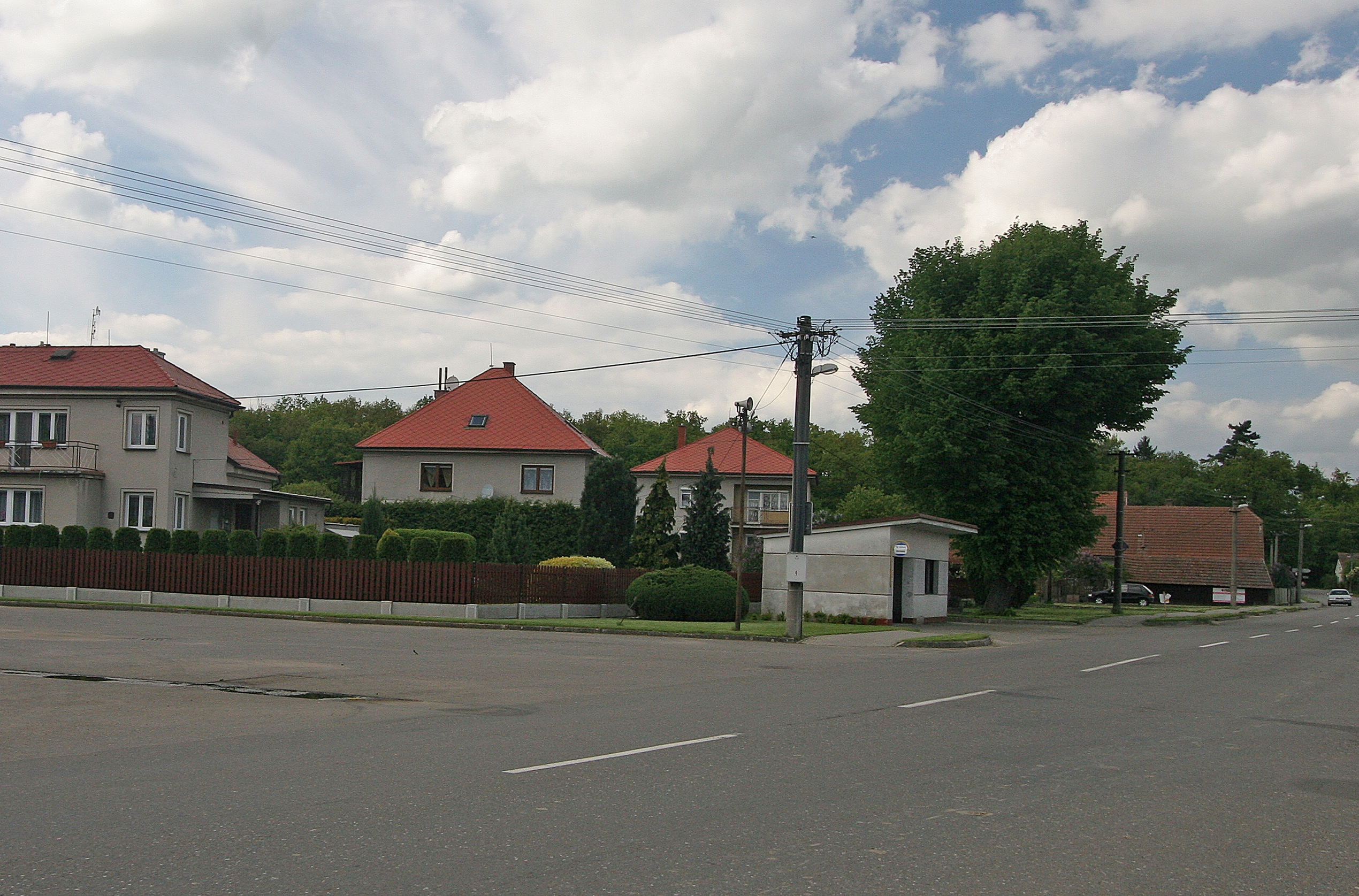 Králíky čp. 51